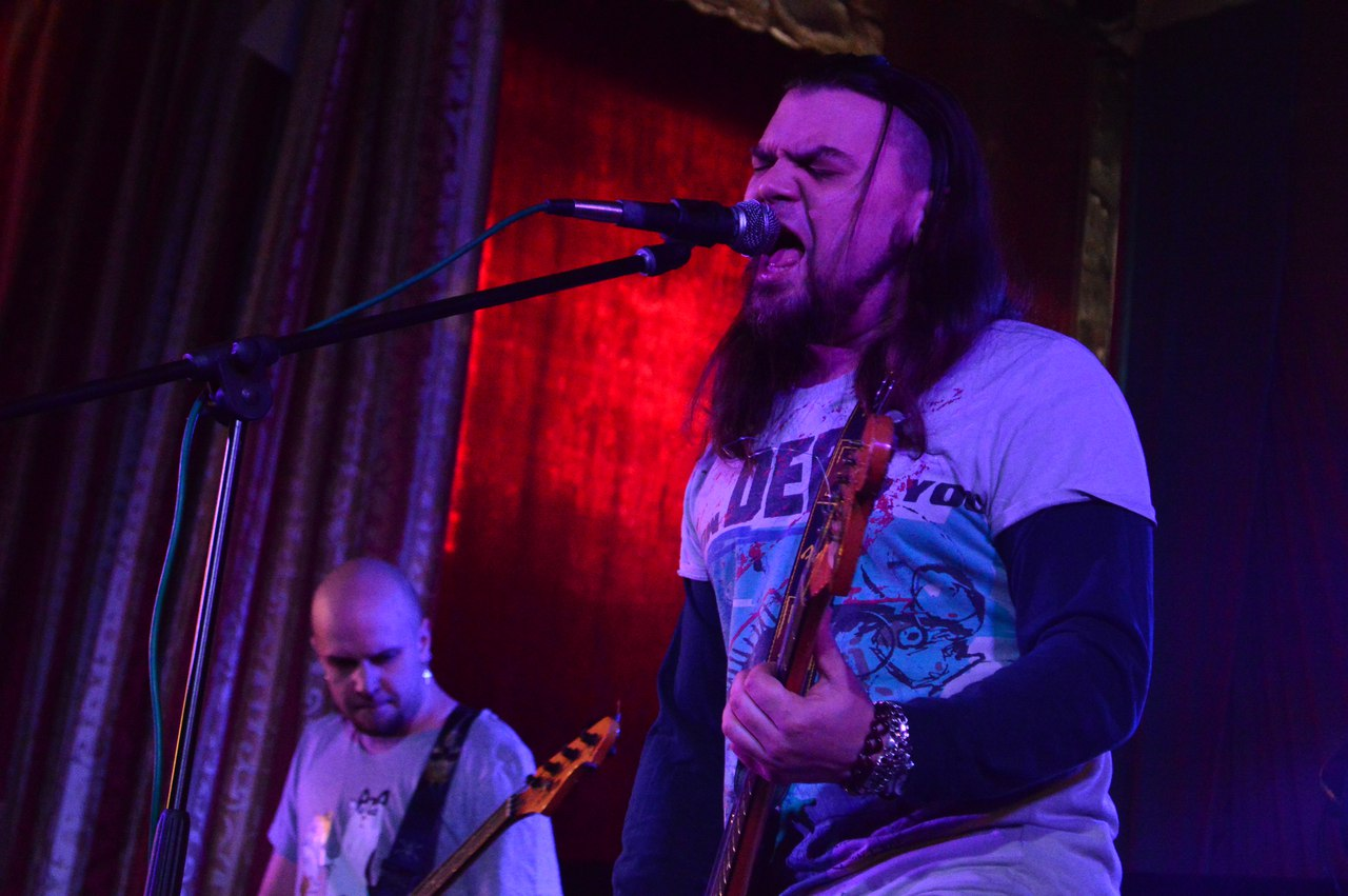 Группа «Тихие парни», г. Фурманов, Ивановская область